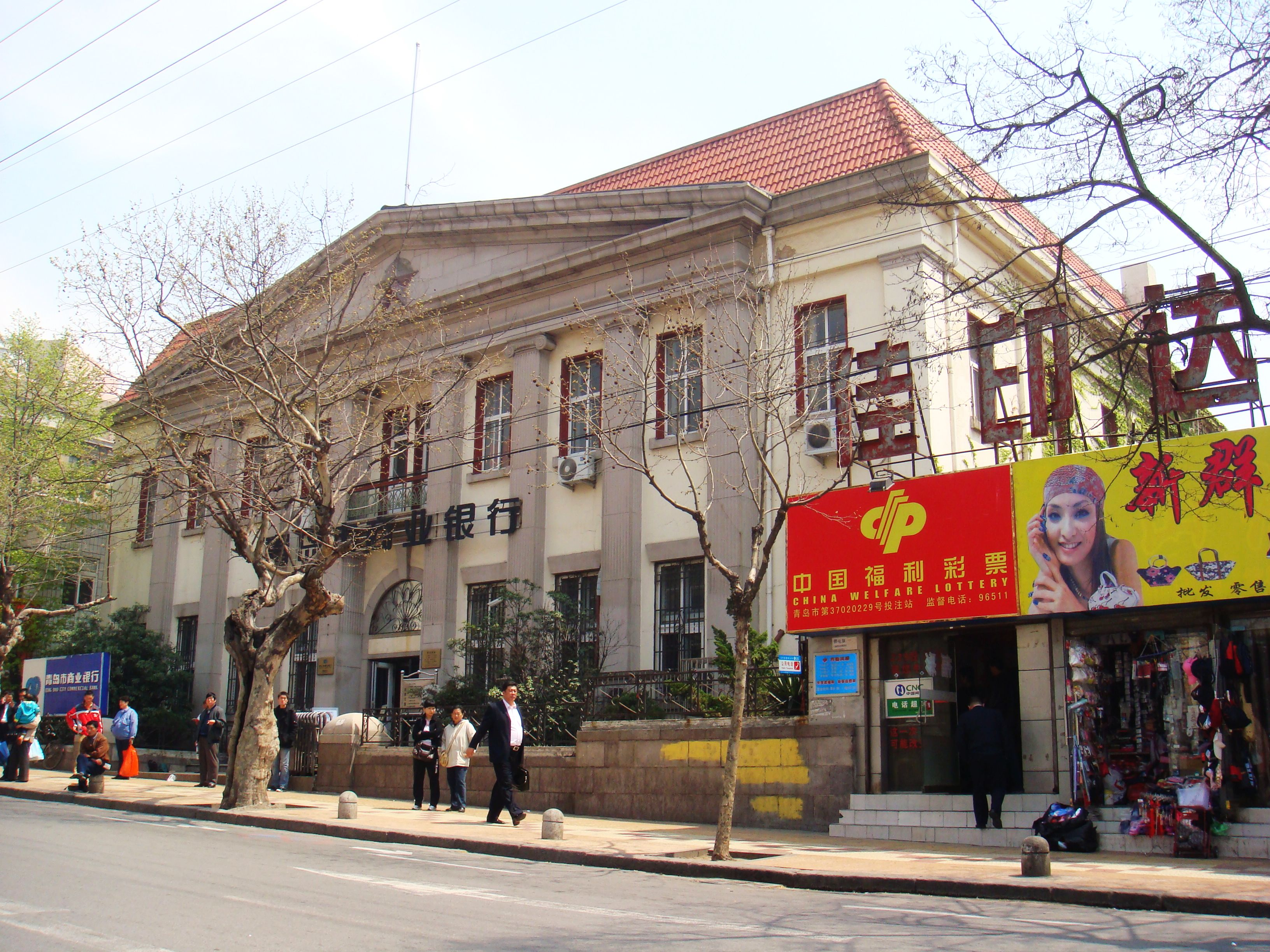 青岛馆陶路1号，横滨正金银行青岛分行旧址。